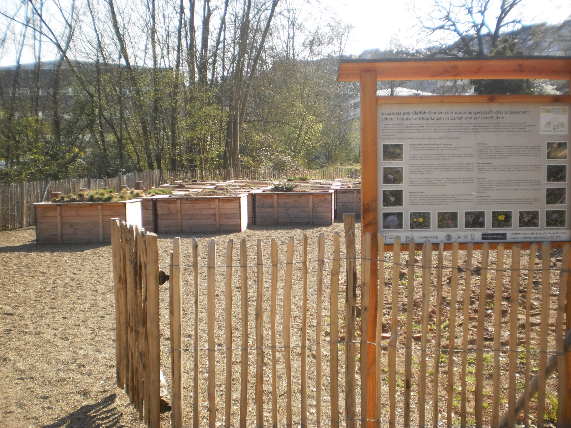 Wildpflanzen-Artenschutzprojekt "Urbanität und Vielfalt" (externer Link urbanitaetundvielfalt.de) zu Beginn des Fühjahrs 2019 im alten botanischen Garten Marburg, Bundesprogramm Biologische Vielfalt und Uni Marburg.